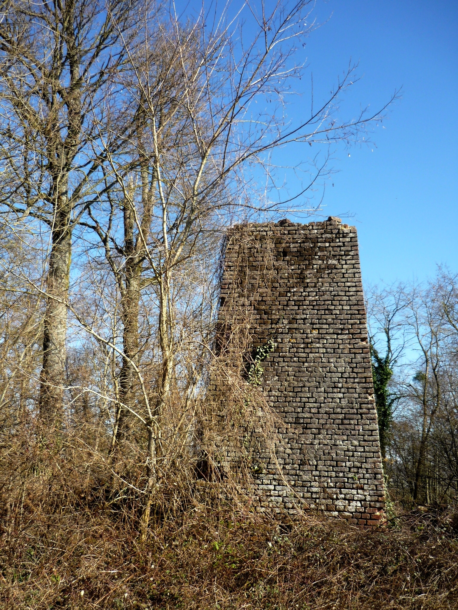 Cheminée géodésique